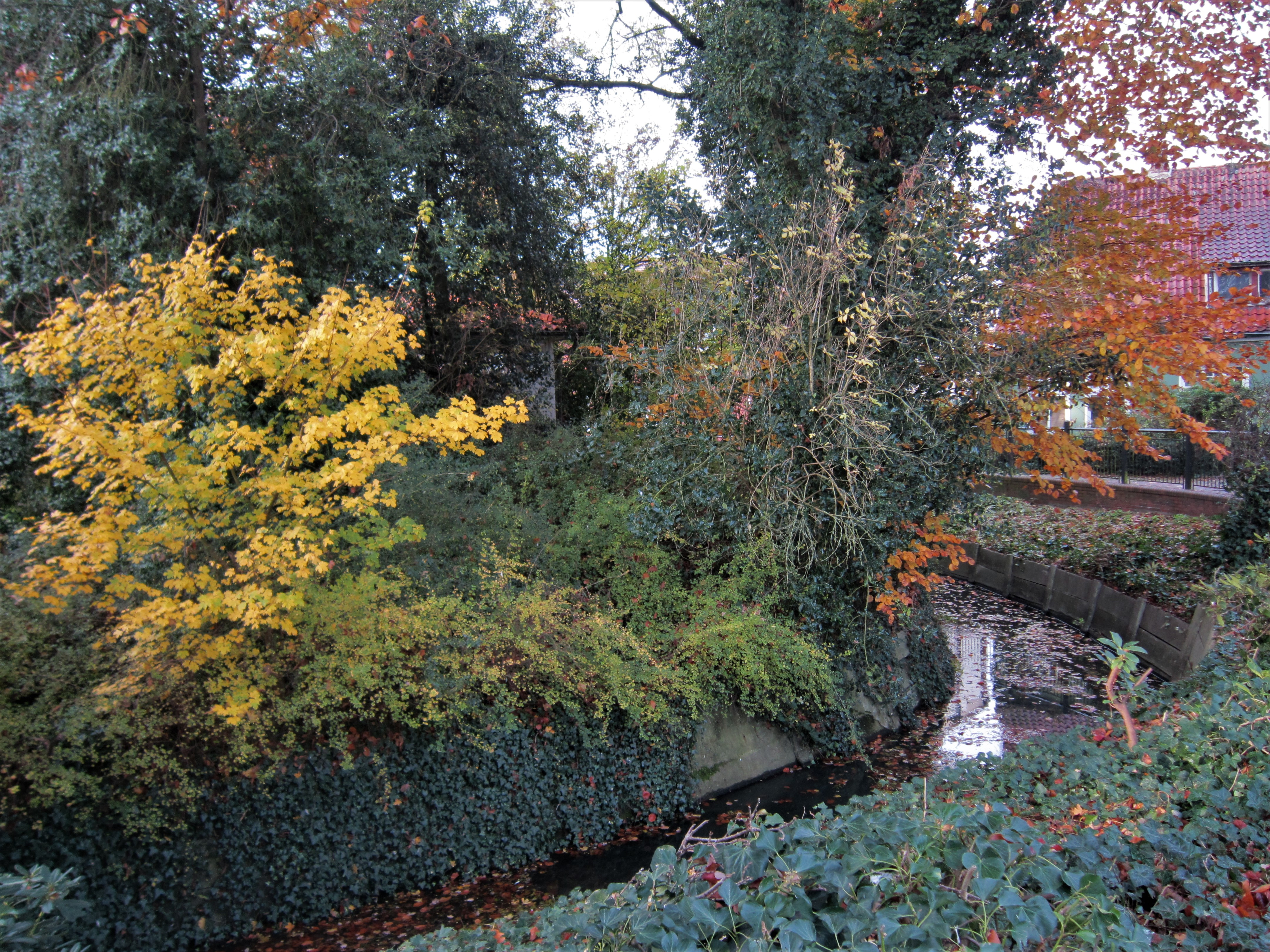 LSG VEC 00051: Wassergraben um das Pastorat Lohne - seit 1937 ein Landschaftsschutzgebiet in der Innenstadt Lohnes (Landkreis Vechta, Niedersachsen)